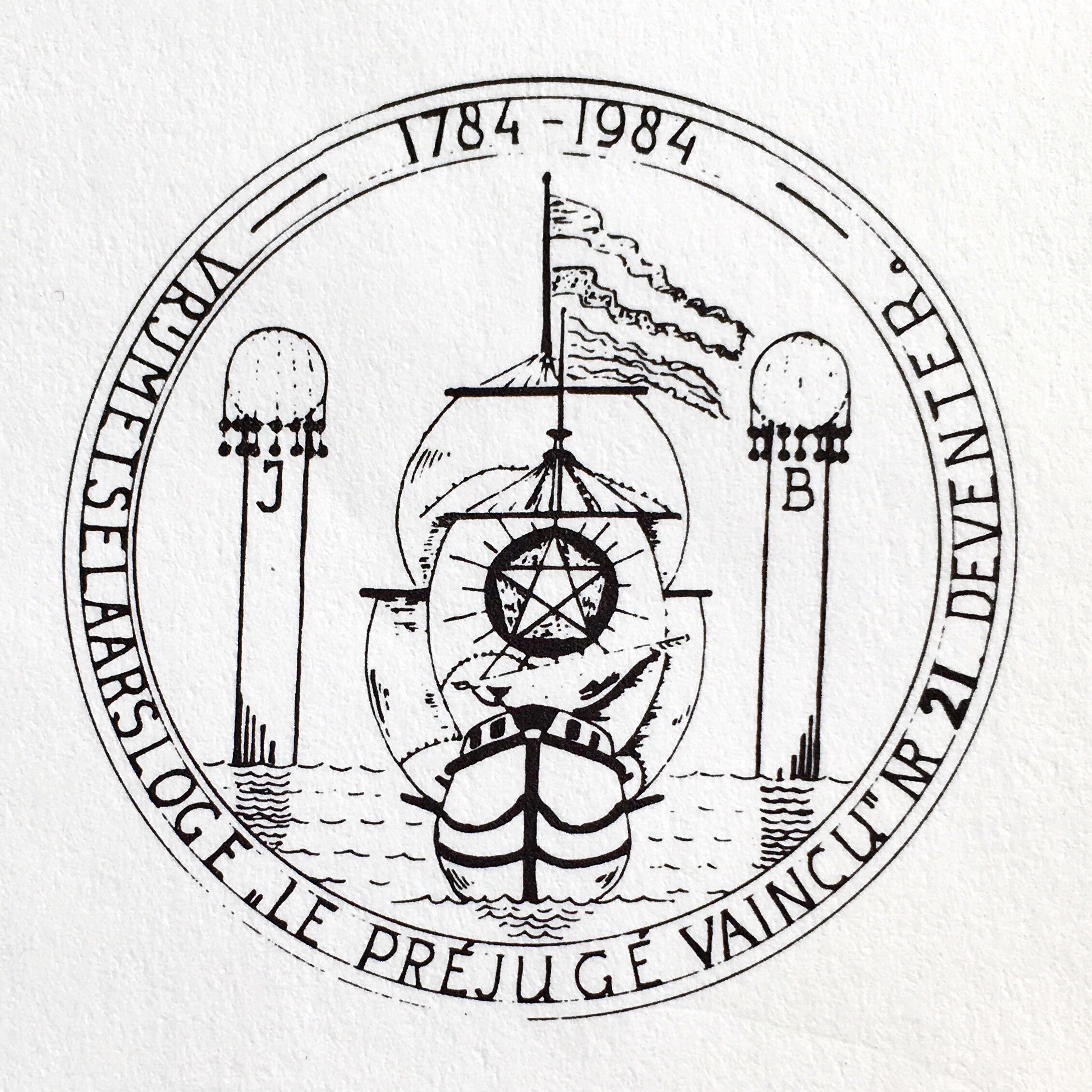 Seal of a Dutch Masonic Lodge